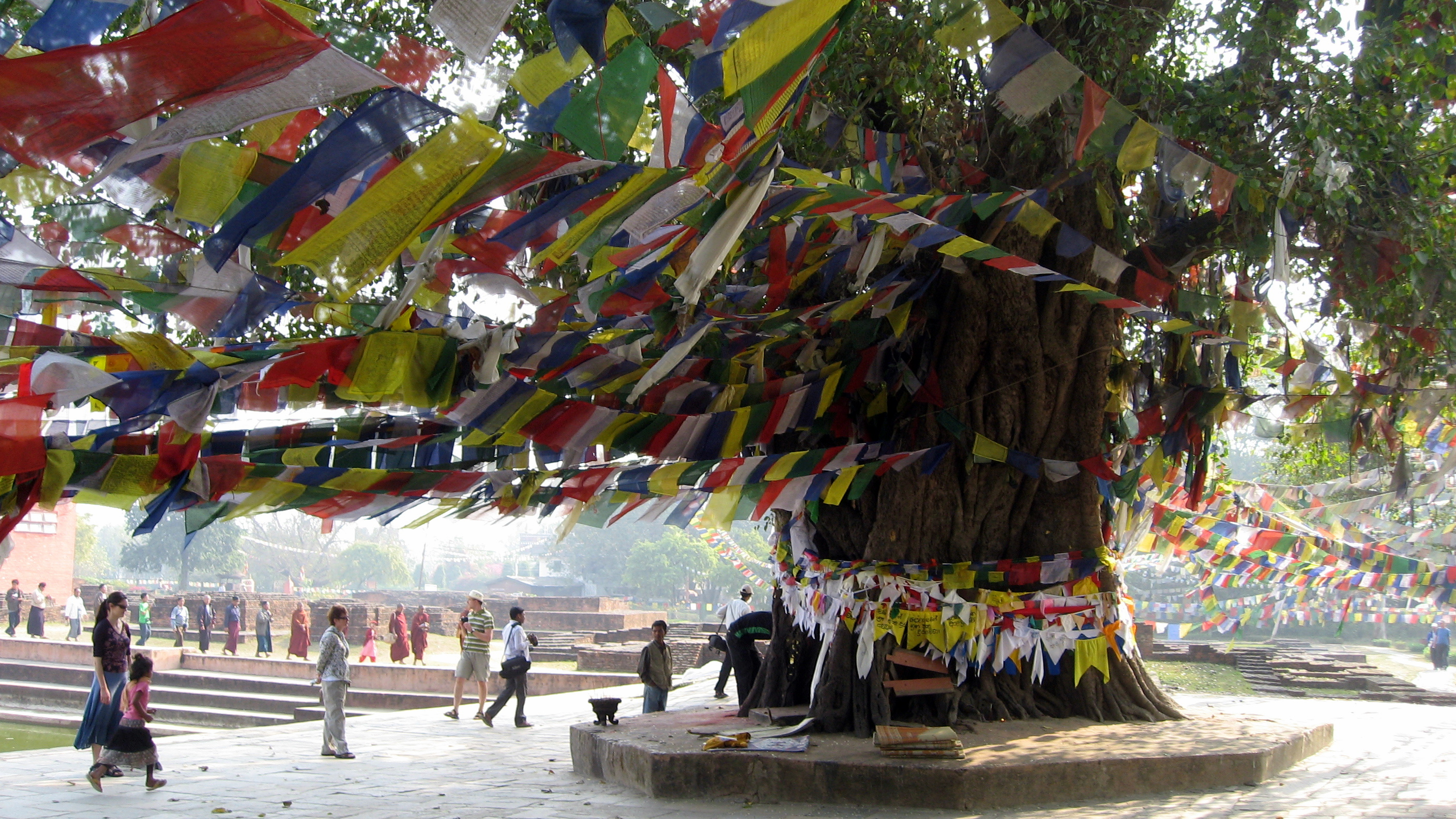 Lumbini